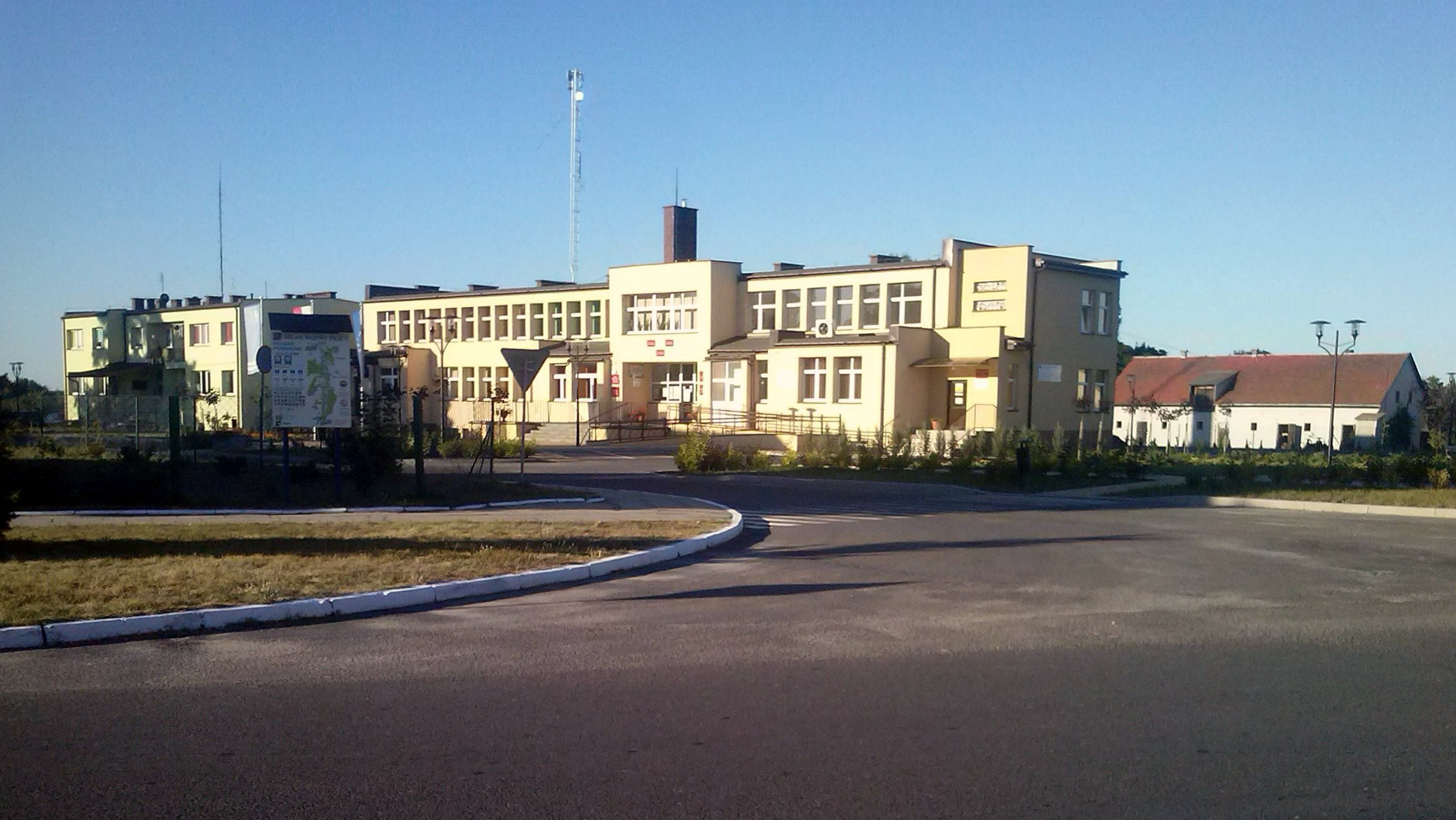 Siedziba gminy Aleksandrów w Aleksandrowie (pow. piotrkowski, woj. łódzkie)